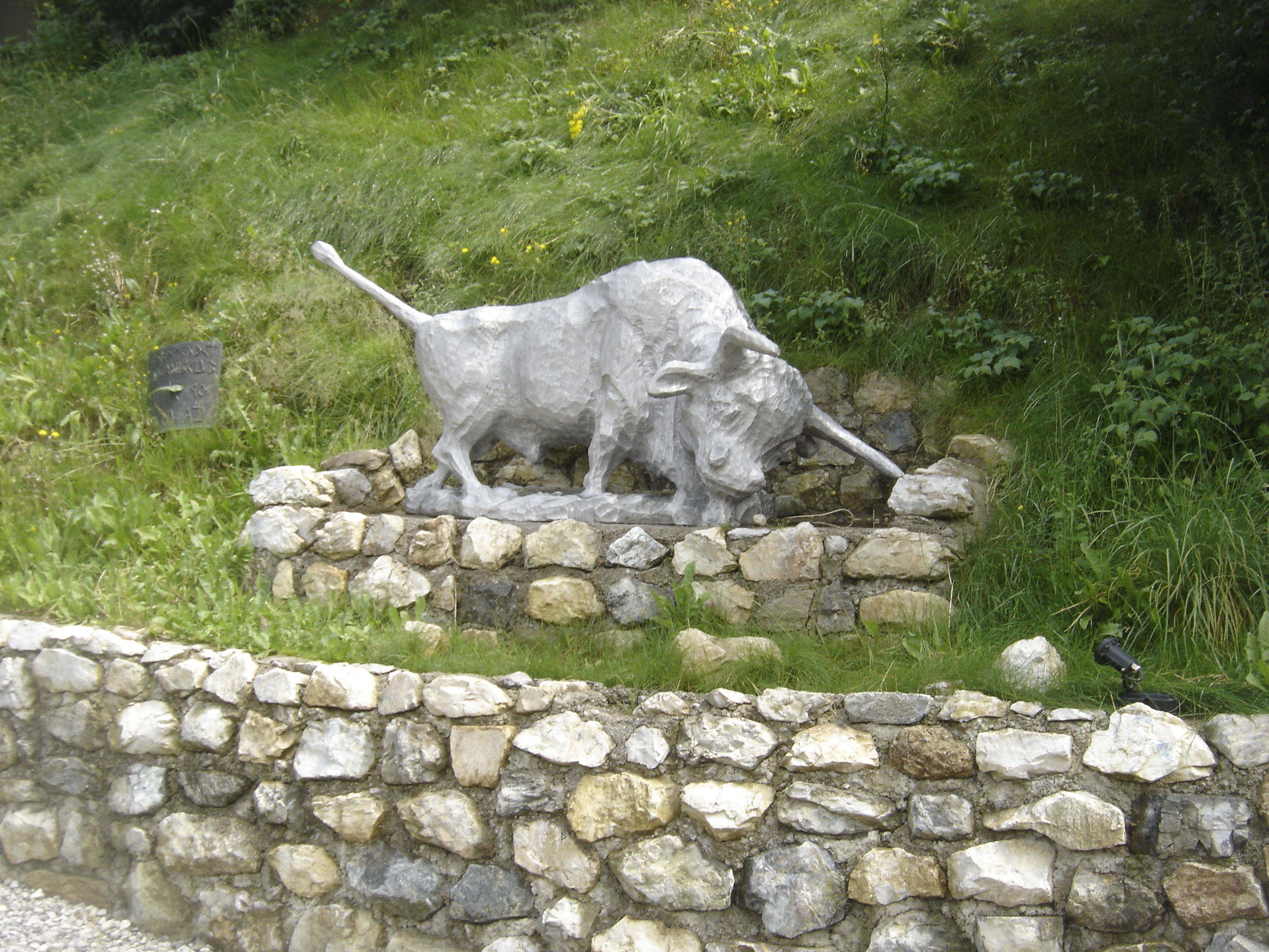 Stierstatue vor dem Schwazer Silberbergwerk